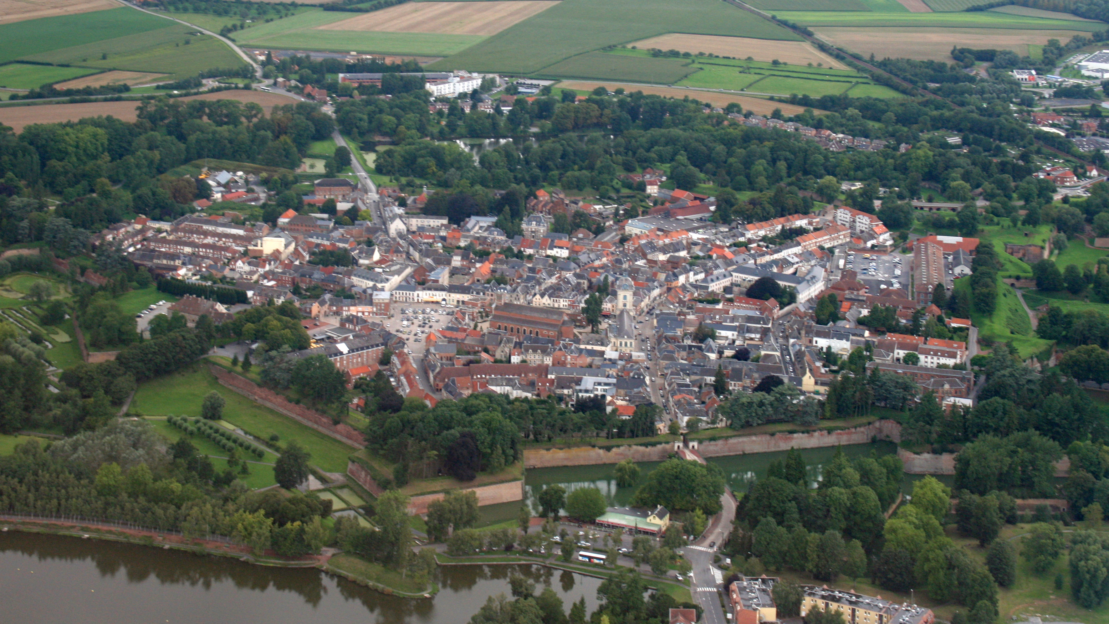 remparts du quesnoy vus du ciel, permettant d'observer dans son intégralité le travail de vauban .